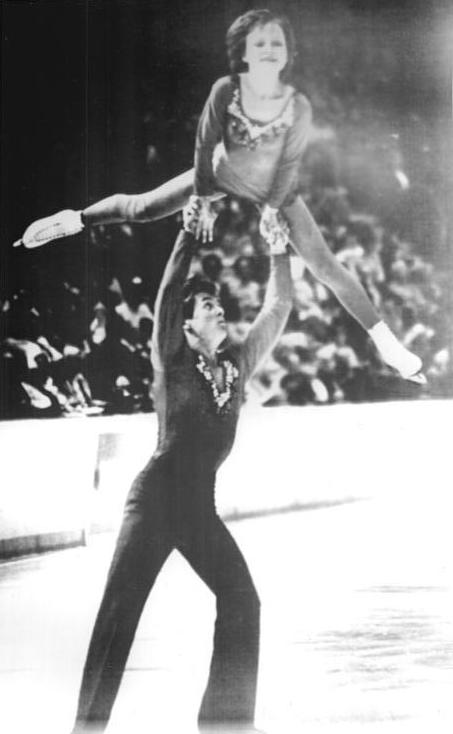 Sabine Bäß, Tassilo Thierbach ÂDN-ZB-AP-Tele-22.9.79 USA-Lake Placid: Das DDR-Paar Sabine Baess - Tassilo Thierbach - WM-Dritte - vom SC Karl-Marx-Stadt gewannen in der neuen Olympia-Sporthalle bei internationalen Eiskunstlauf-Wettbewerben die Paarlauf-Konkurrenz. Sie behaupteten sich mit Platzziffer 11 und 137,04 Pkt. vor zwei US-amerikanischen Paaren.